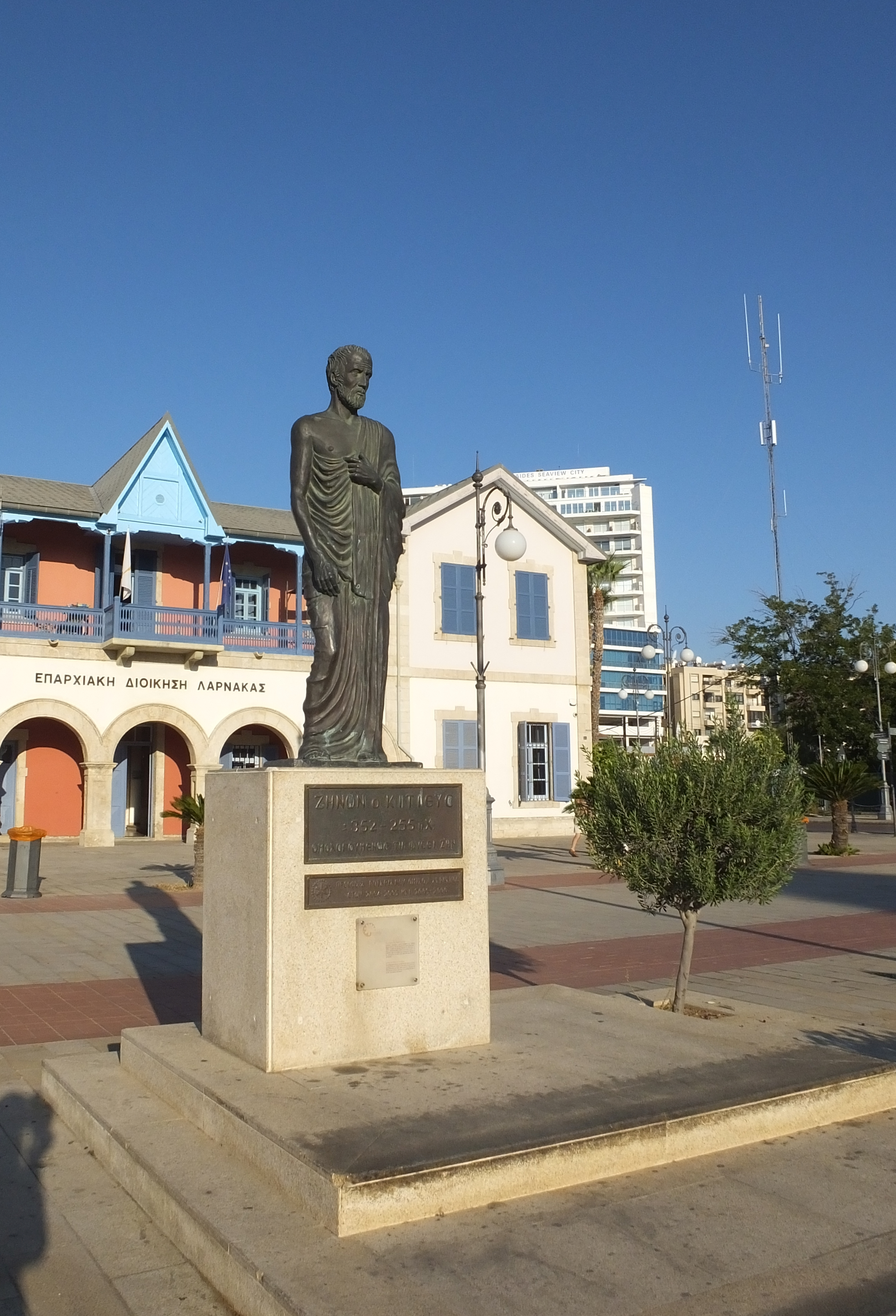 Posąg Zenona z Kitionu w Larnace